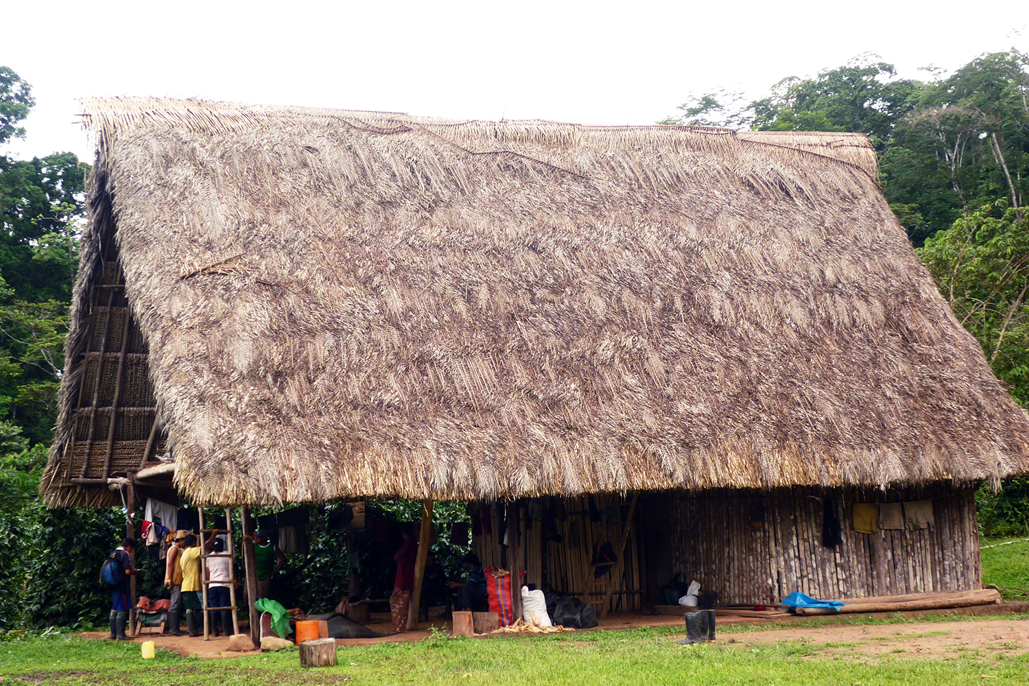 Tambo cerca a Cachiyacu